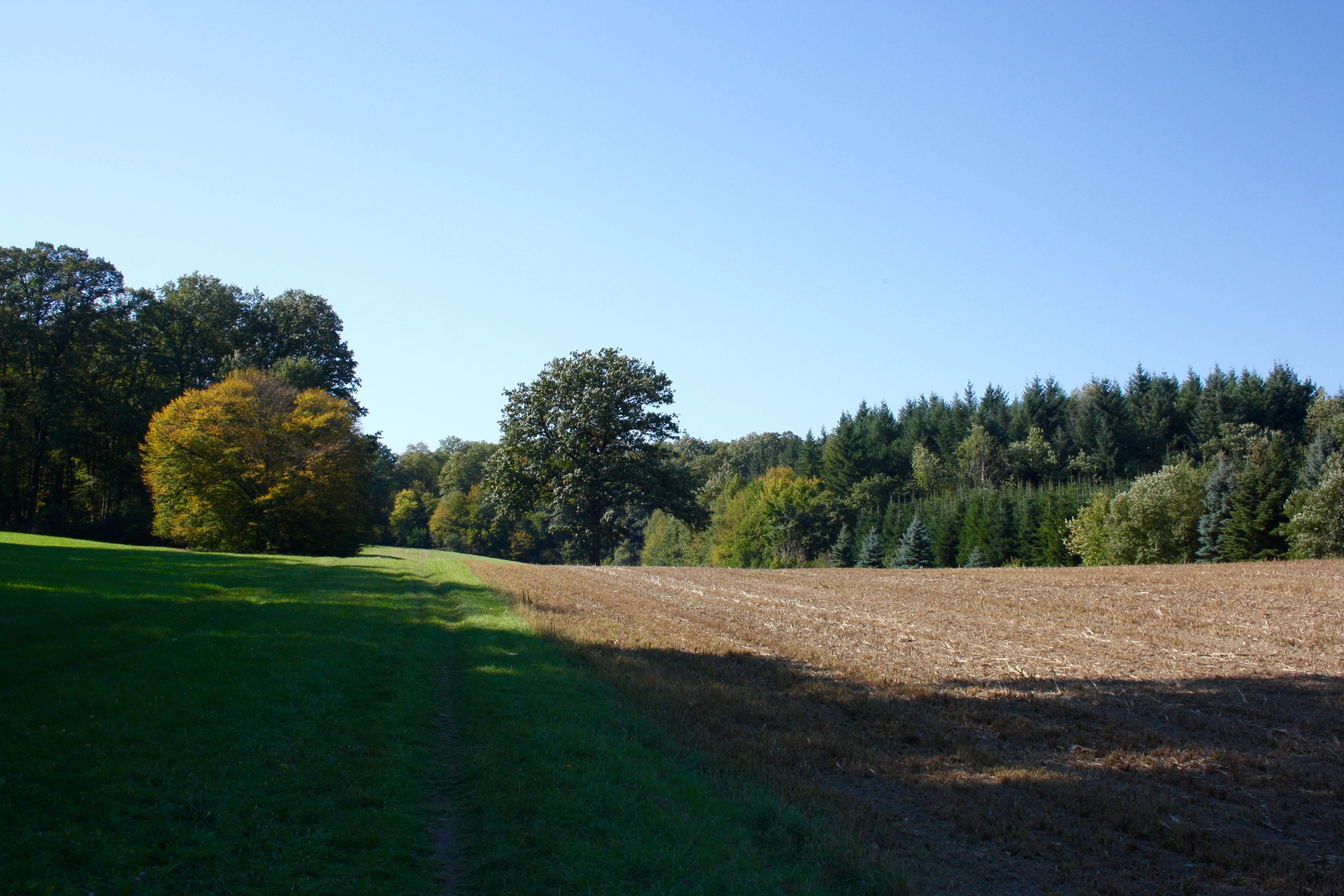 Wiese am Tschogel südlich des Kaiserzipfs in Wien-Kalksburg.